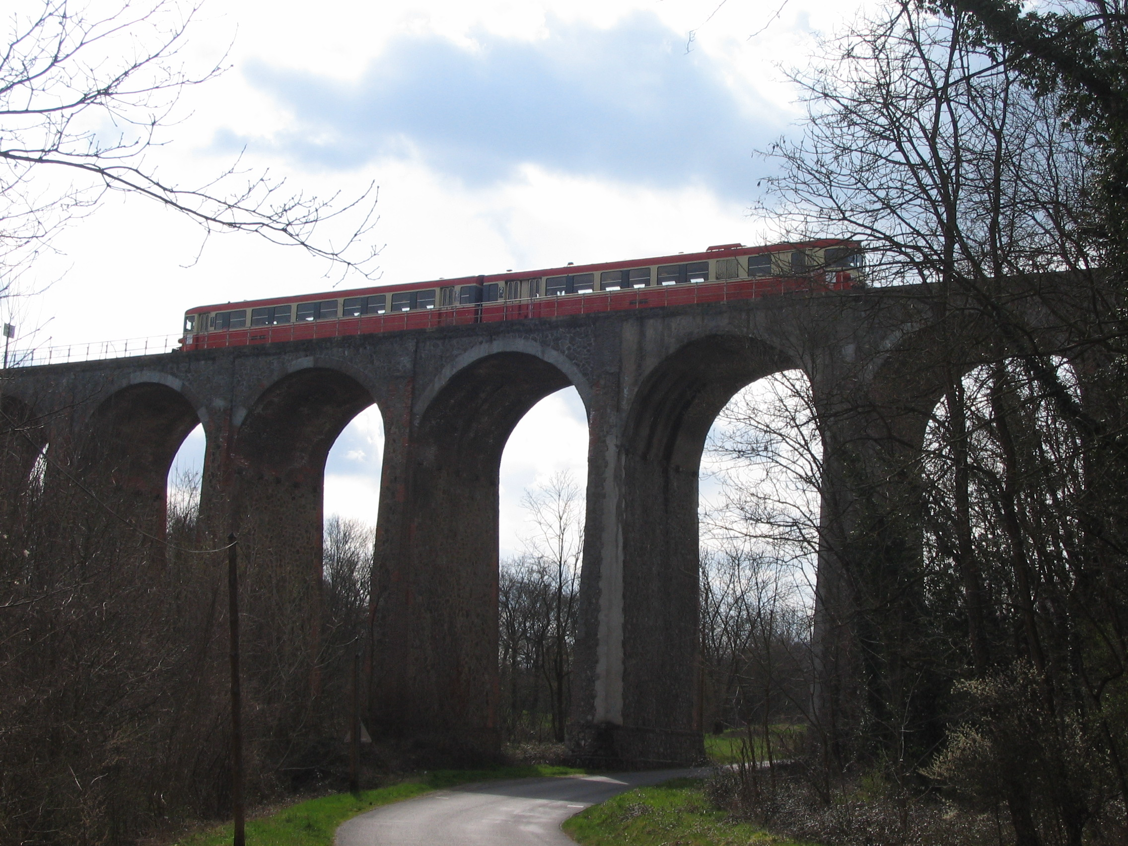 EAD (Eléments Automoteurs Doubles) série X 4300-4500, passe viaduc ligne Lyon St Paul-Tassin-l'Arbresle-Sain Bel à la sortie de Lentilly (Rhône) -- produits de 1963 à 70, les derniers exemplaires de cet autorail autrefois très répandu, à livrée rouge-crème-gris caractéristique, sont retirés du service fin 2009.